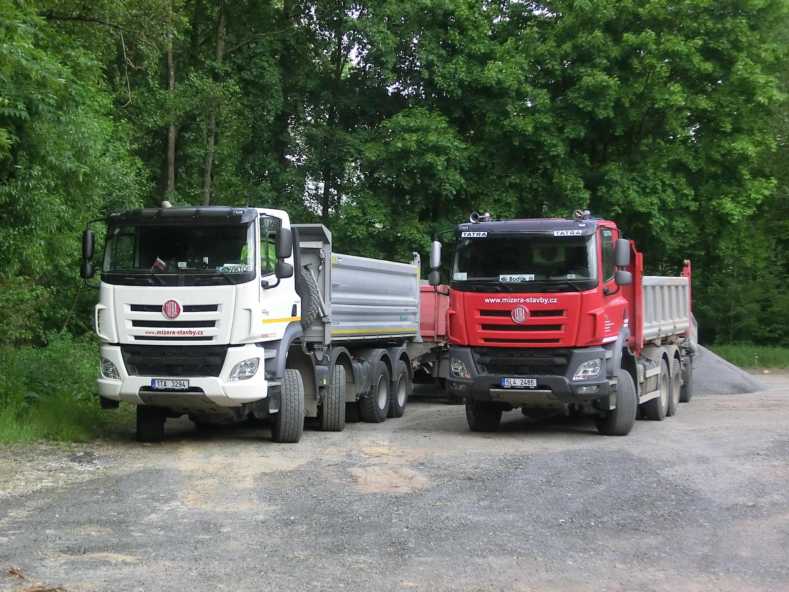 Čtyřnápravový i třínápravový sklápěč Tatra 158 Phoenix Euro 6 patří společnosti MIZERA-STAVBY a.s., Lomnice nad Popelkou. Zachyceny na deponii stavebního materiálu na Malé Skále.